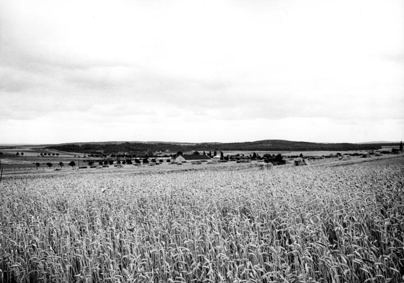 Neuerbaute Aussiedlungshöfe (Flurbereinigung) an der Grenze der Gemarkung des Dorfes Kommern/ Euskirchen Flurbereinigung in Kommern, Kreis Euskirchen Im Zuge der Flurbereinigung in Deutschland mit Hilfe des "Grünen Plans" werden die räumlich verstreuten Ackerstücke eines Bauernhofes untereinander ausgetauscht, so daß die Ackerfluren eines Bauernhofes möglichst um diesen herumliegen. Bei der Dichte eines Bauerndorfes ist es zur Durchführung dieses Vorganges notwendig, "flurbereinigte" Bauernhöfe aus dem Dorf herauszuziehen und an die Grenzen der Dorfgemarkung zu ihren Ackerfluren zu legen. Vorteil: Auflockerung des Dorfes. Fachname des Regierungsplanes: Rationalisierung von Arbeitsraum und Arbeitskräften. Finanzielle Mittel: Für Neubau des Bauernhofes an der Gemarkengrenze werden bei zu wenig Eigenkapital vom Staat zinslose Darlehen vergeben. Aufschließung von Straße, Kanalisation, Elektrik usw. trägt der Staat.